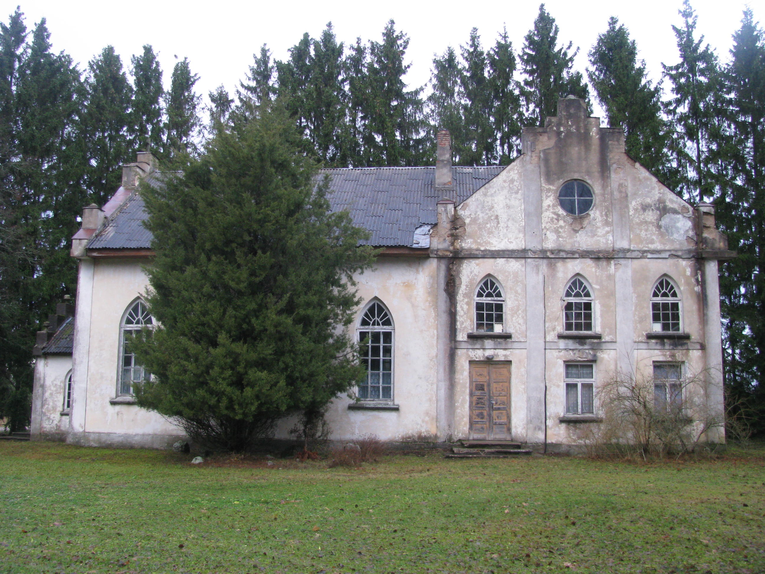 Aizvīķu baptistu baznīca